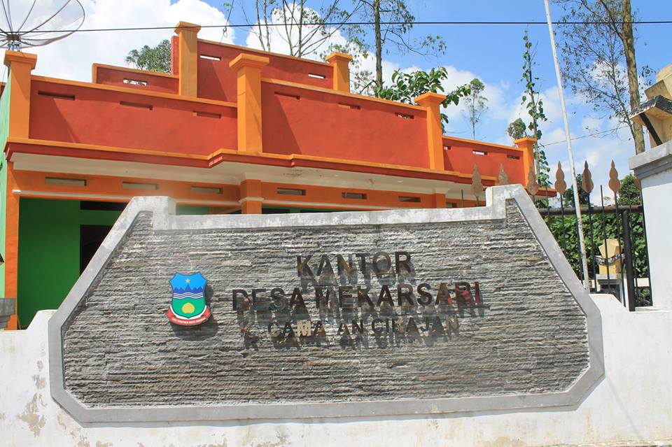 Kantor Lurah Mekarsari